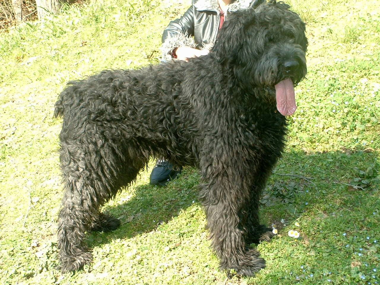 Bouvier des Flandres photographié par moi-même. Oeuvre personnelle, libre de droits (domaine public).